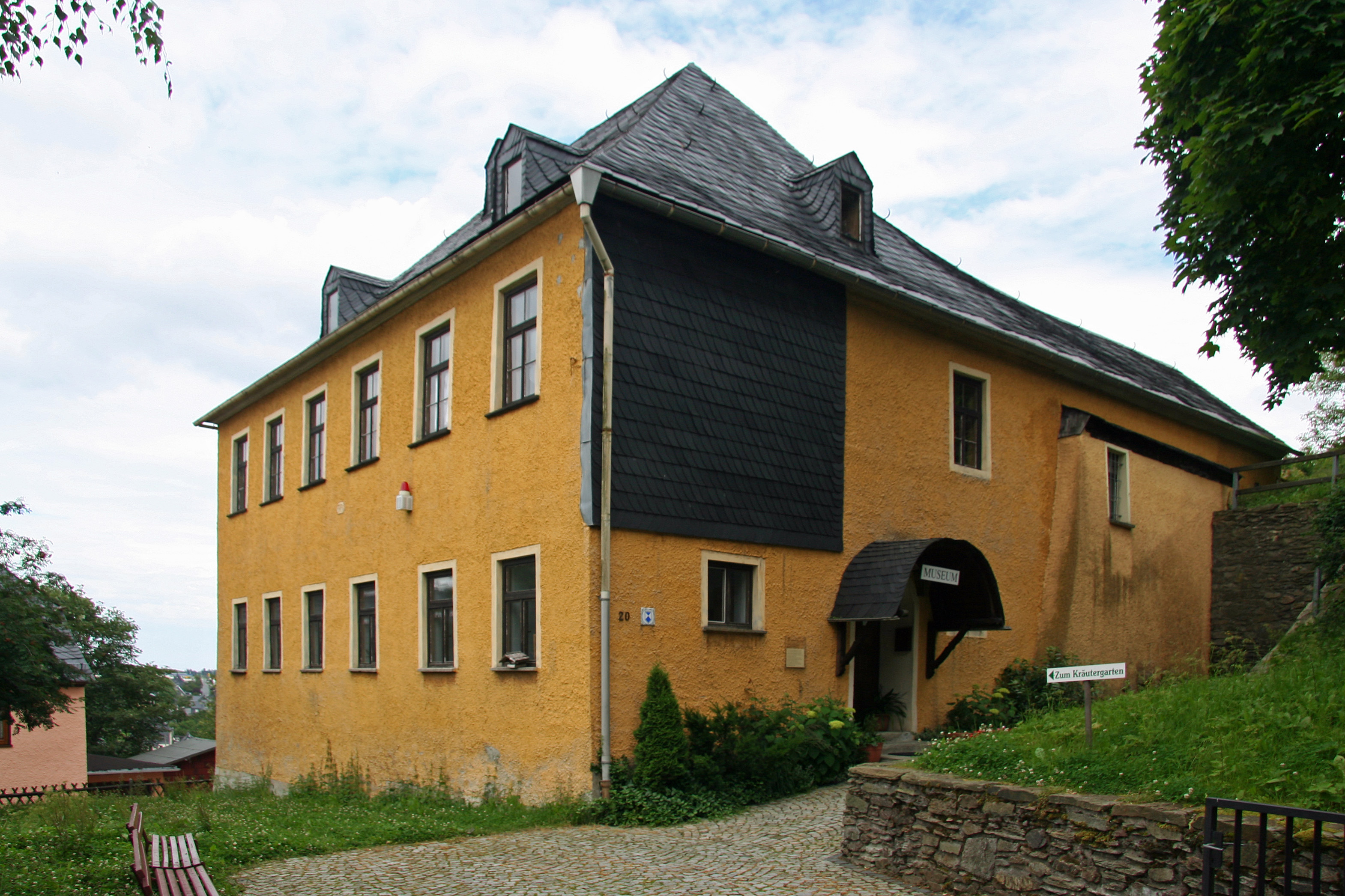 Regionalmuseum in der fürstlichen Oberförsterei von Bad Lobenstein